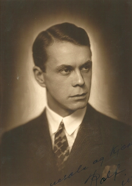 Frithjof Fearnley, norsk skuespiller, portrett, mann, skuespiller, brystbilde.